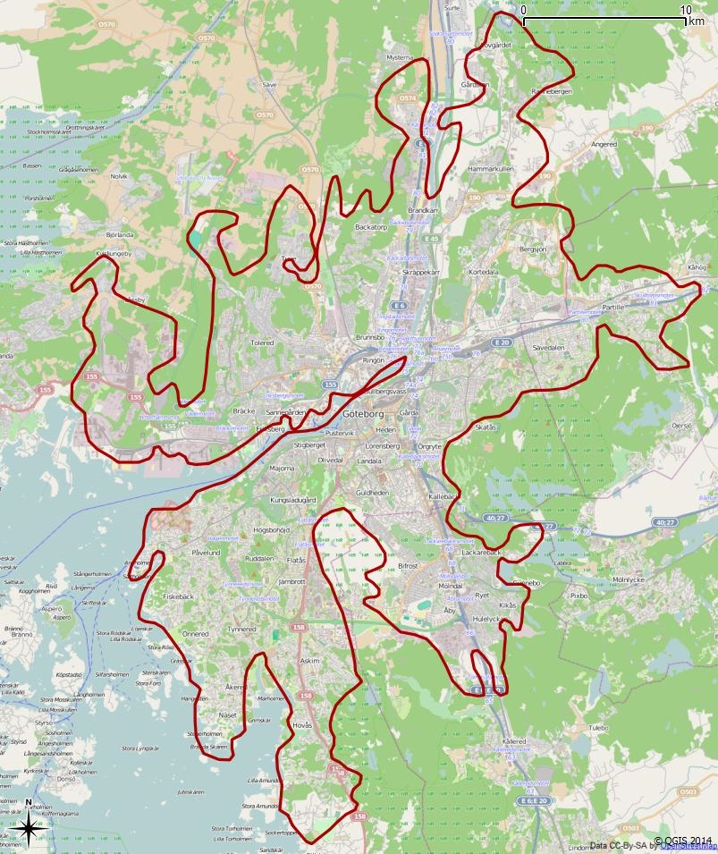 Tätorten Göteborgs gränser enligt Atlas över rikets indelningar 1992.